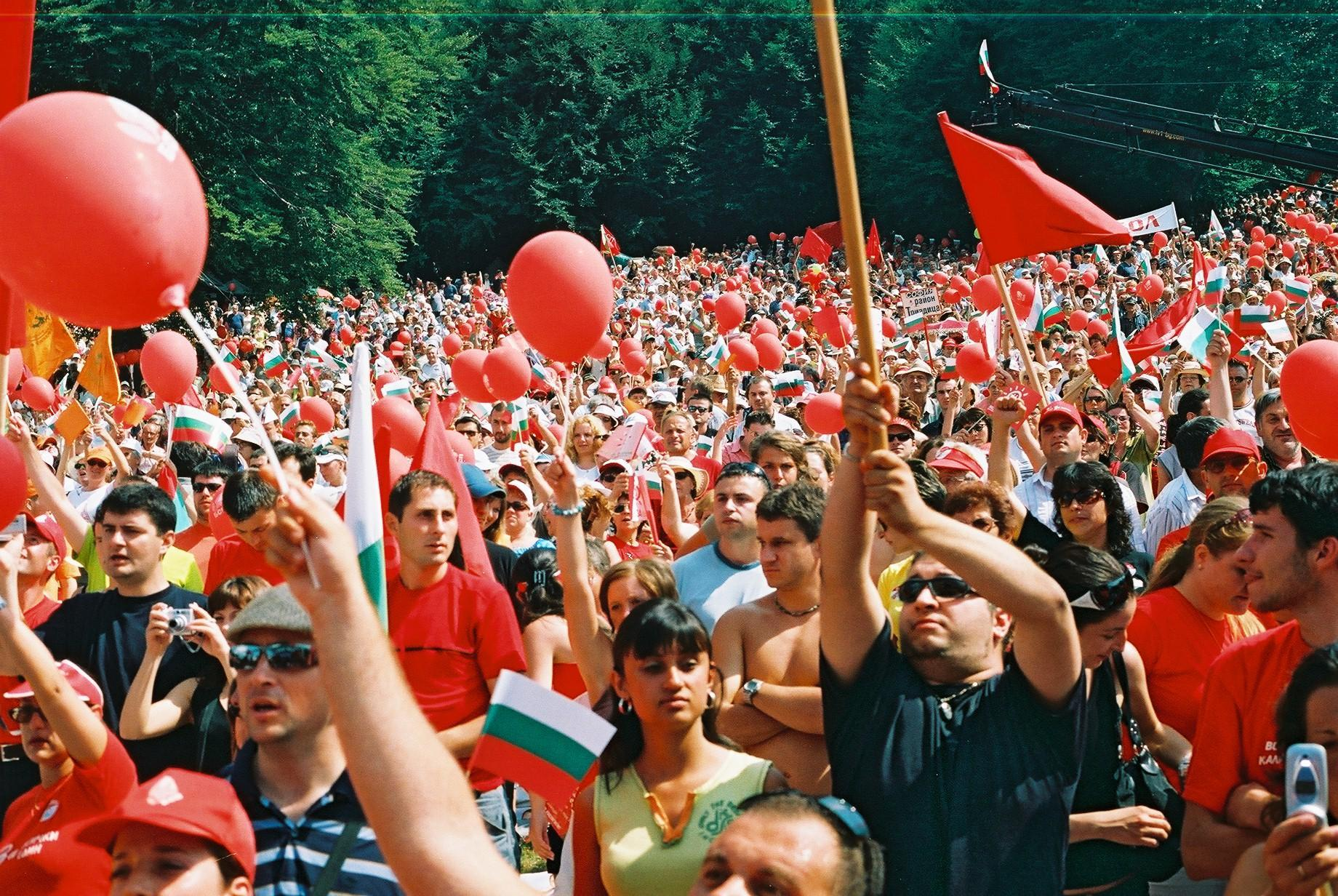 Бузлуджански митинг, 2005 г. Социалистически събор през 2005 г.